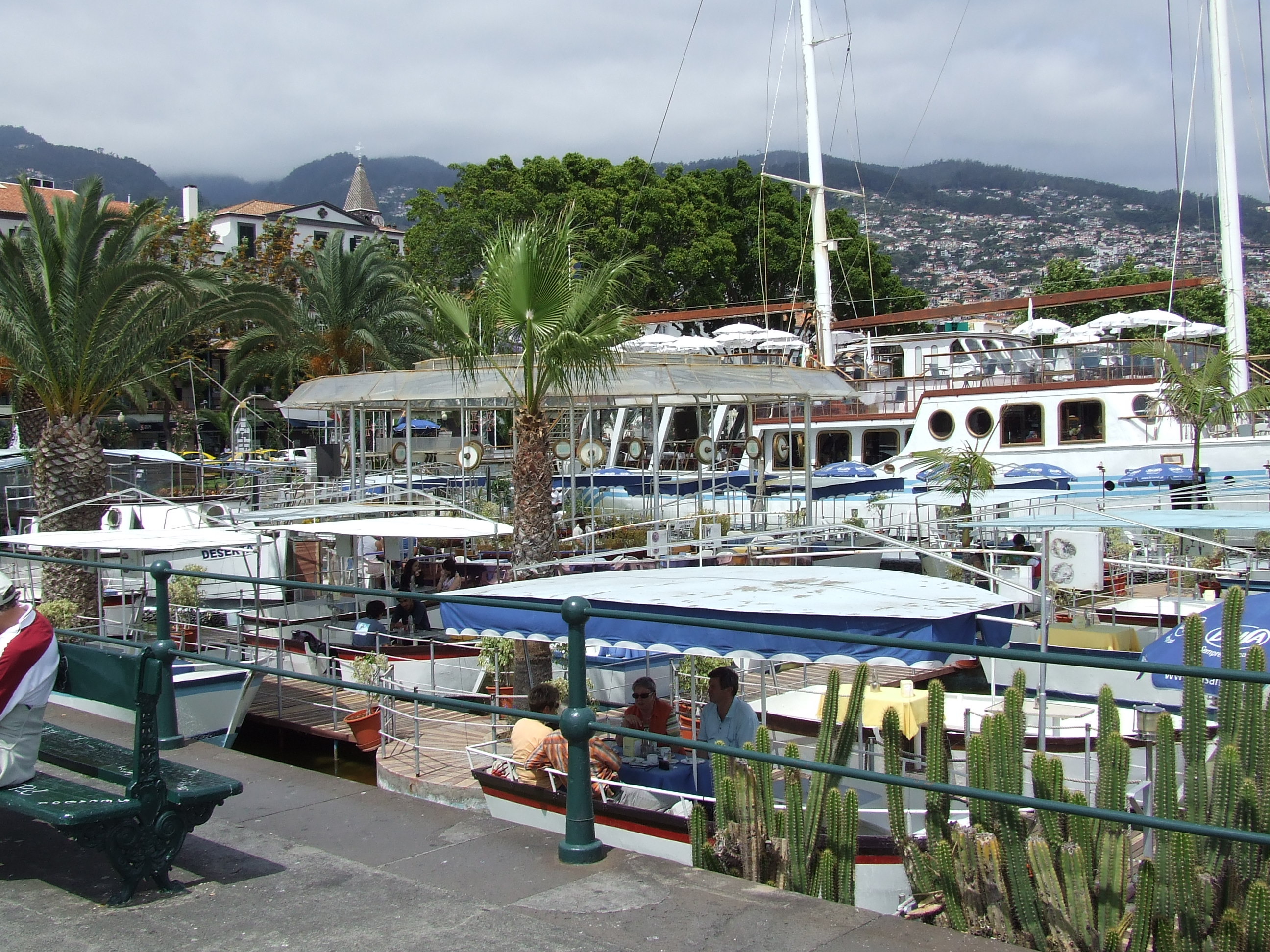 Madeira - Funchal - Marina